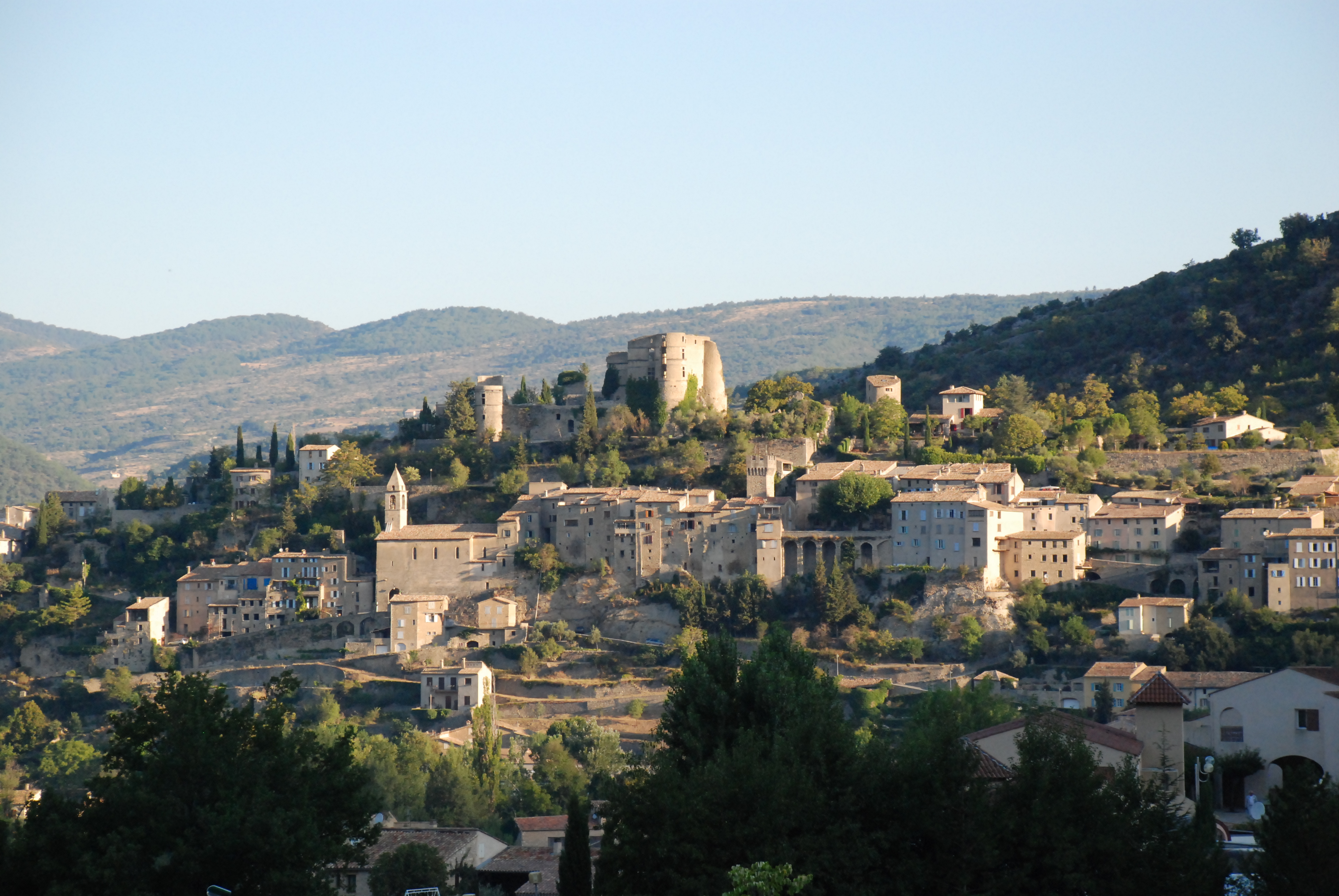 Montbrun-les-Bains-panorama